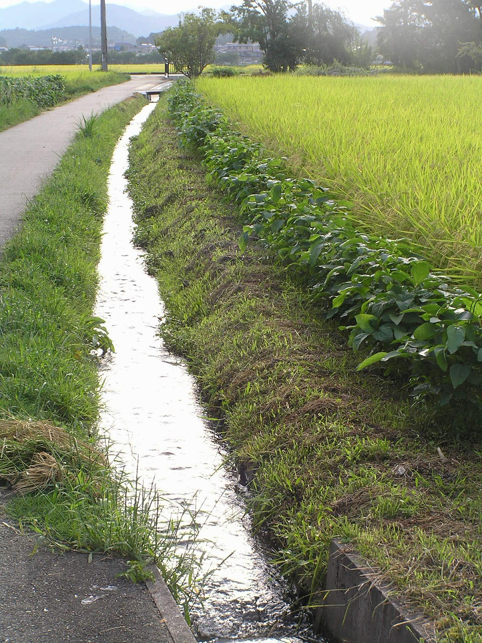 用水路（ようすいろ）は、灌漑や水道、工業用などのために水を引く目的で造られた水路である